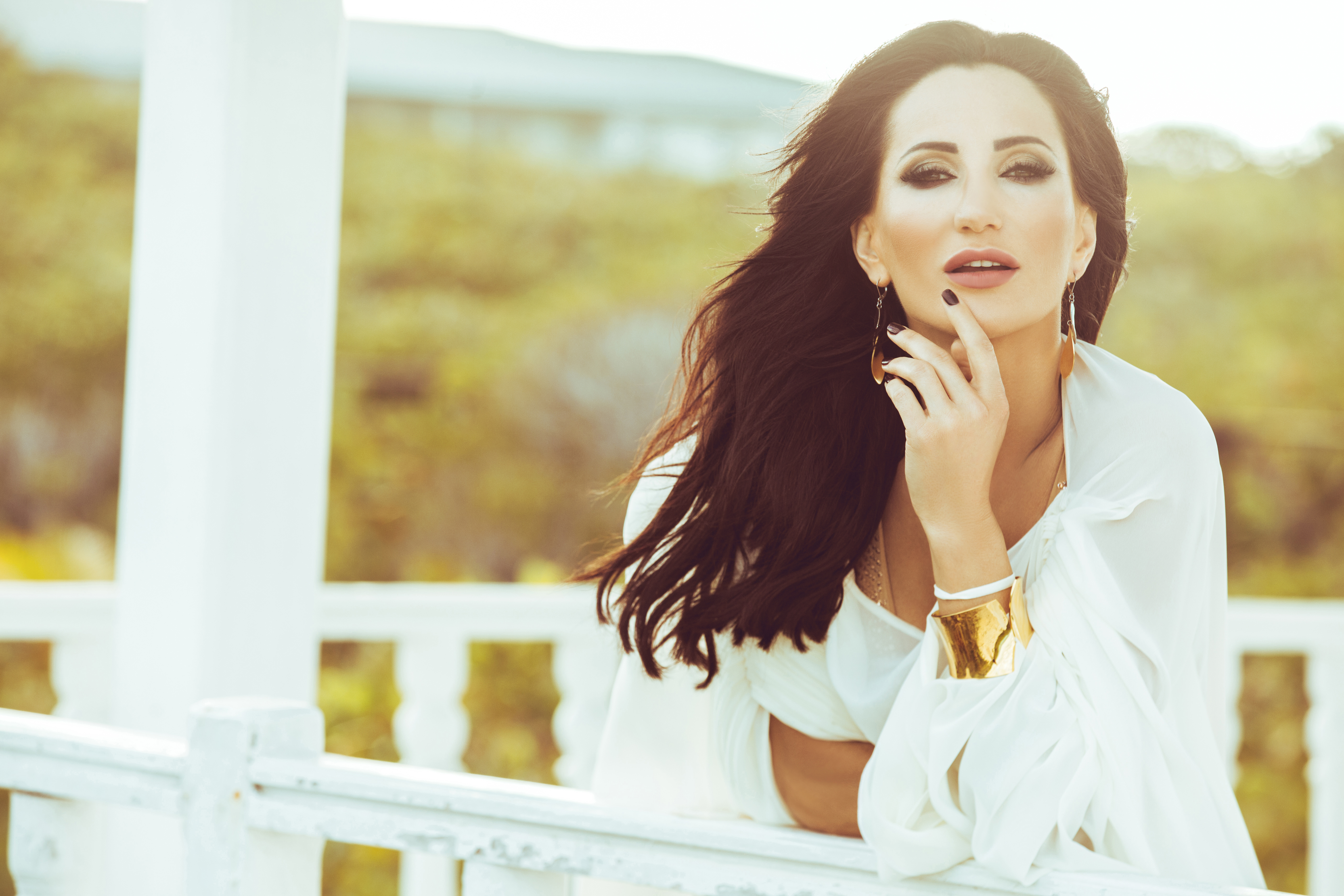 Justyna Steczkowska